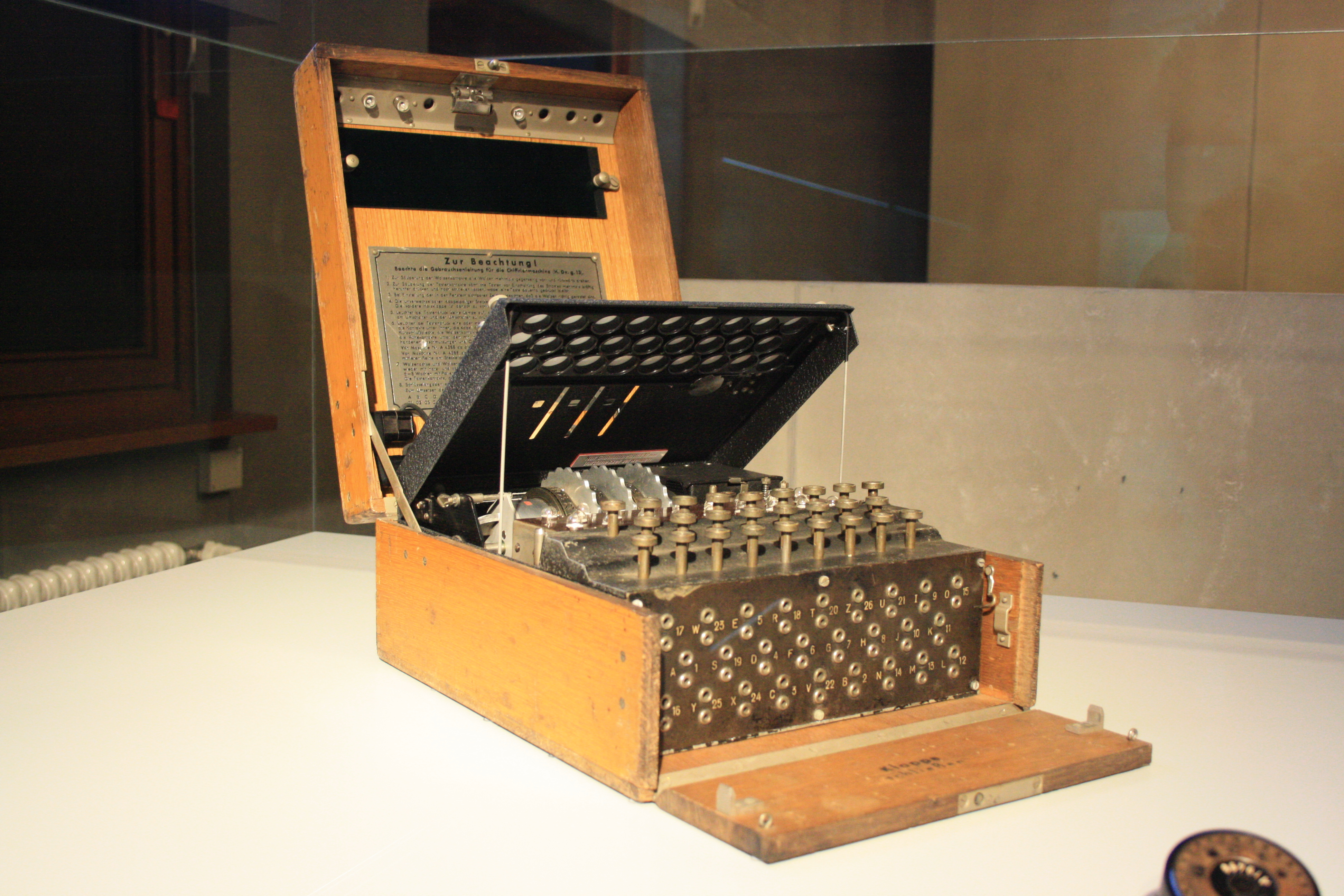 Chiffriermaschine "Enigma" aus dem Zweiten Weltkrieg im Spy Museum Berlin